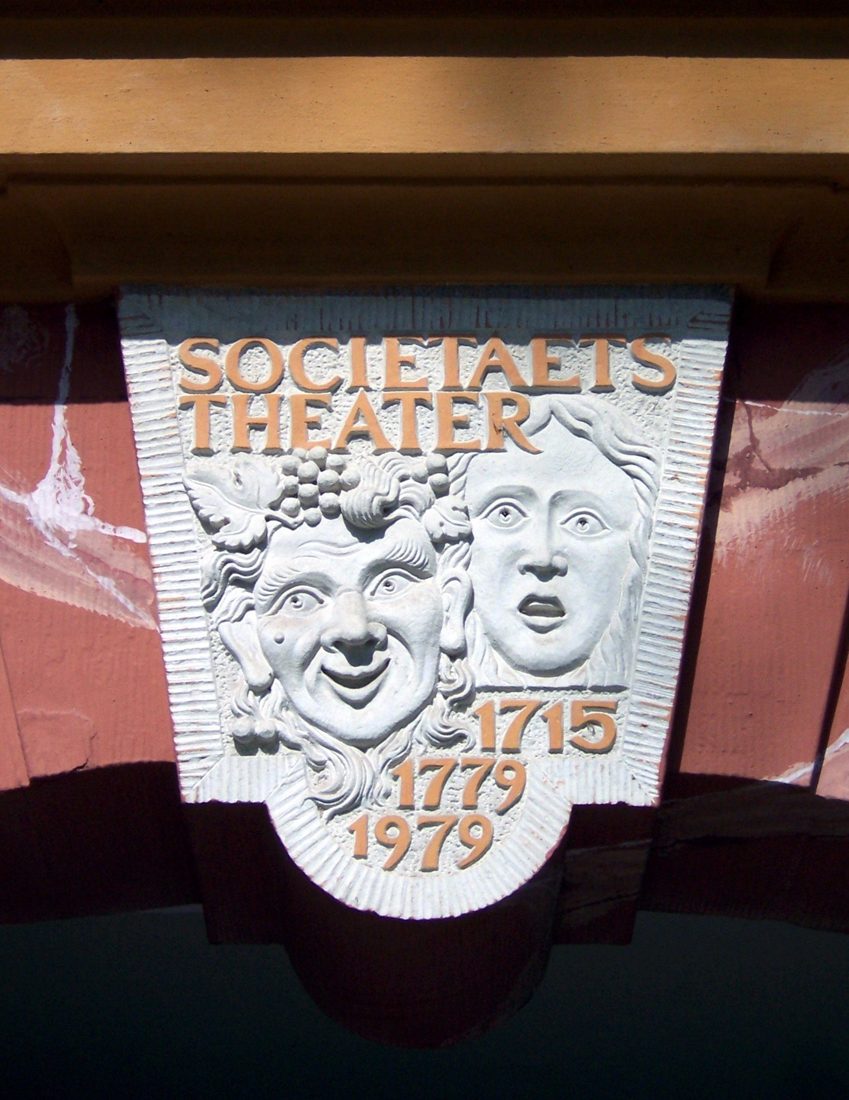 Schlussstein am Eingang zum Societaetstheaters in Dresden nach einem Entwurf von Jürgen Mehlhorn 1979.